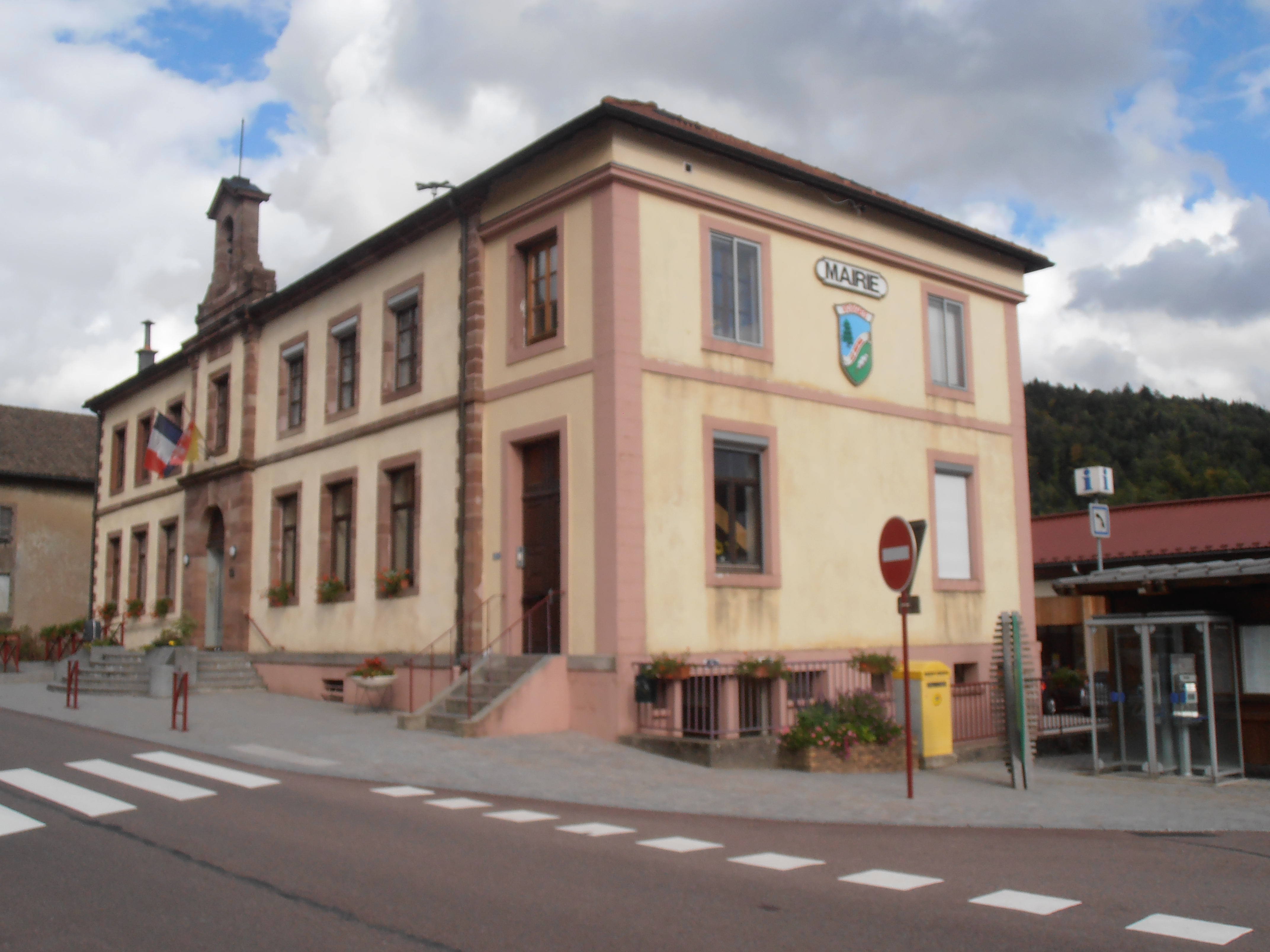 Vosges, Le Ménil, Mairie